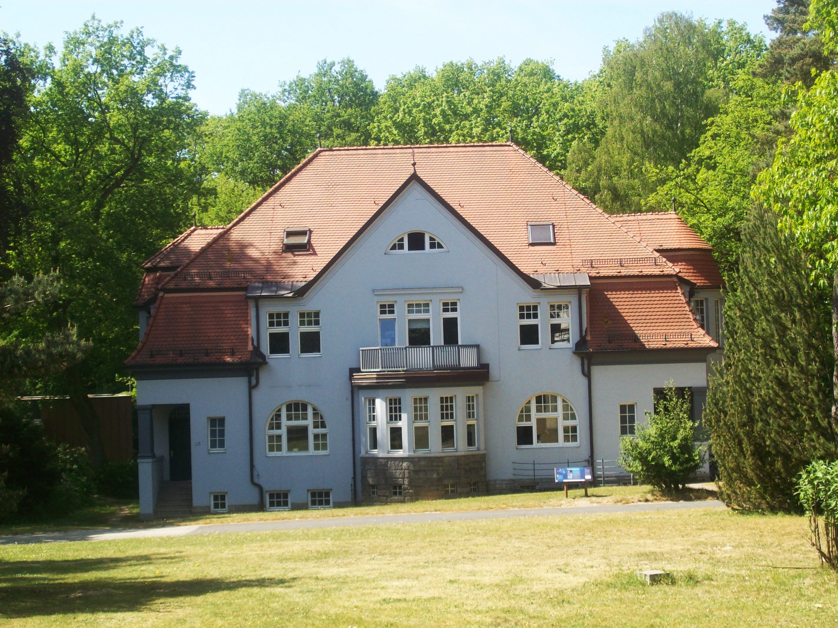 Sternwarte Hamburg-Bergedorf, Hauptgebäude